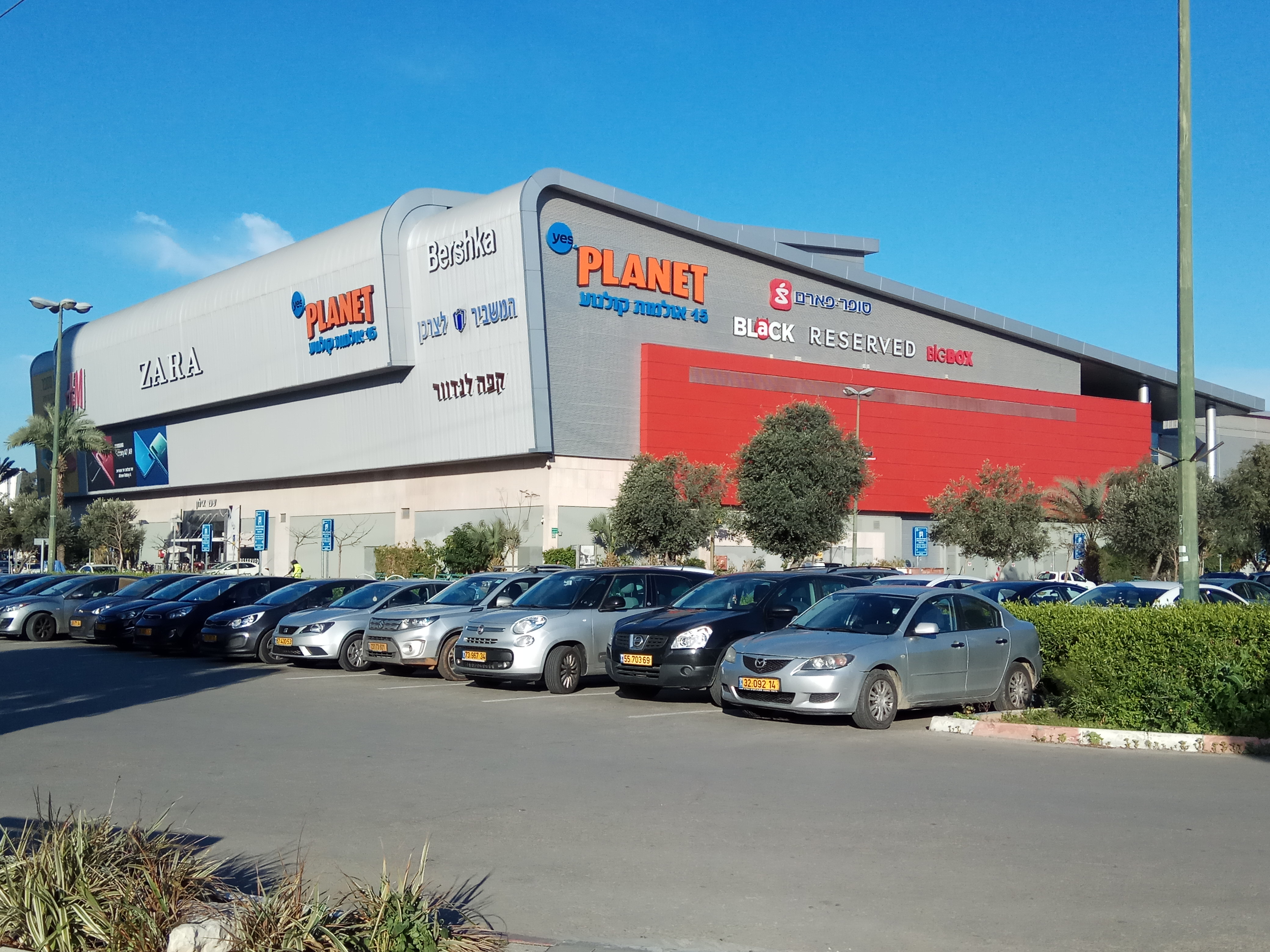 קניון עזריאלי איילון ברמת גן